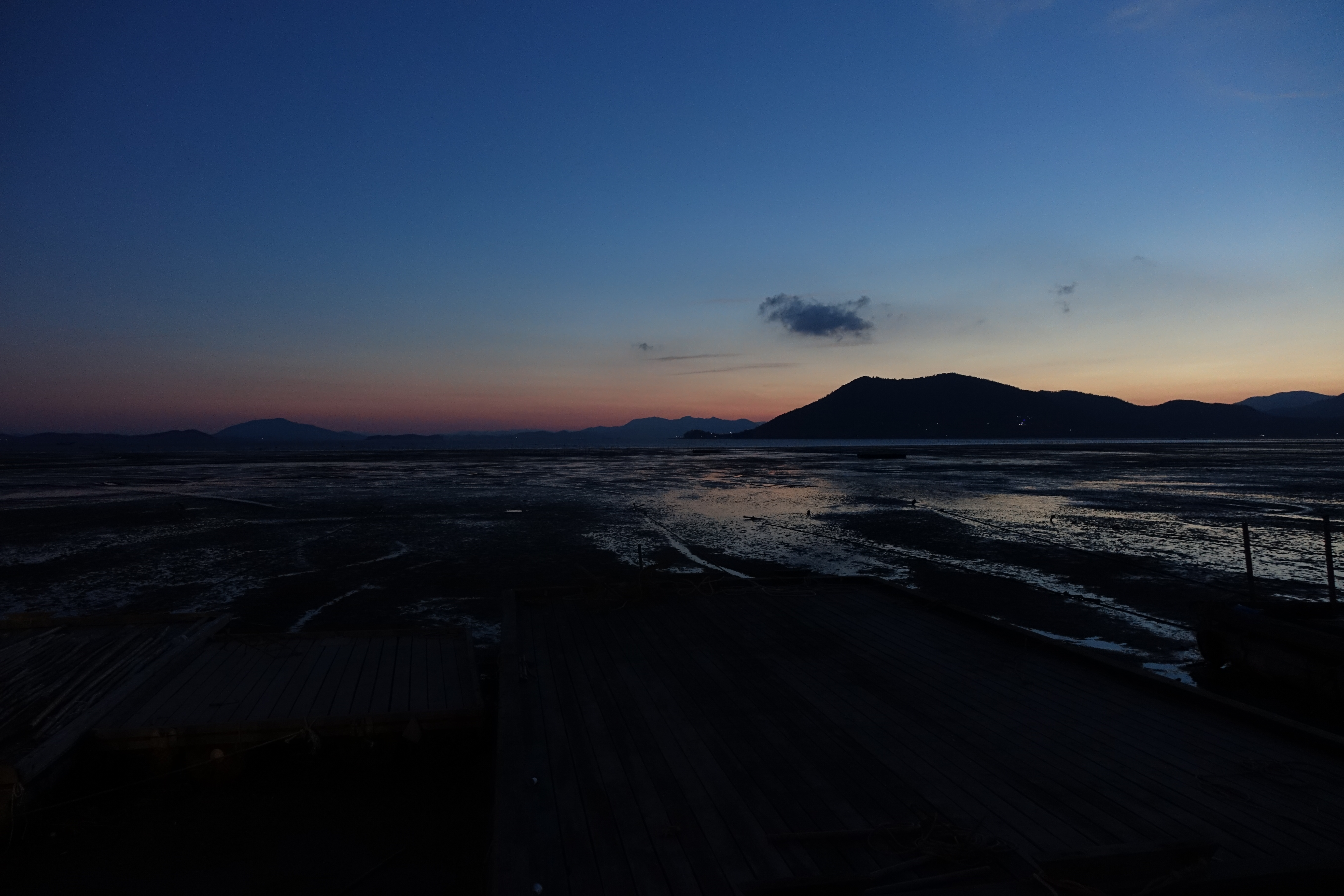 와온해변, 2015년 8월 최광모 하계휴가